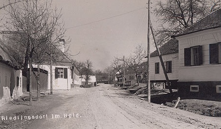 Hauptstraße in 1930er-Jahren Obertrum